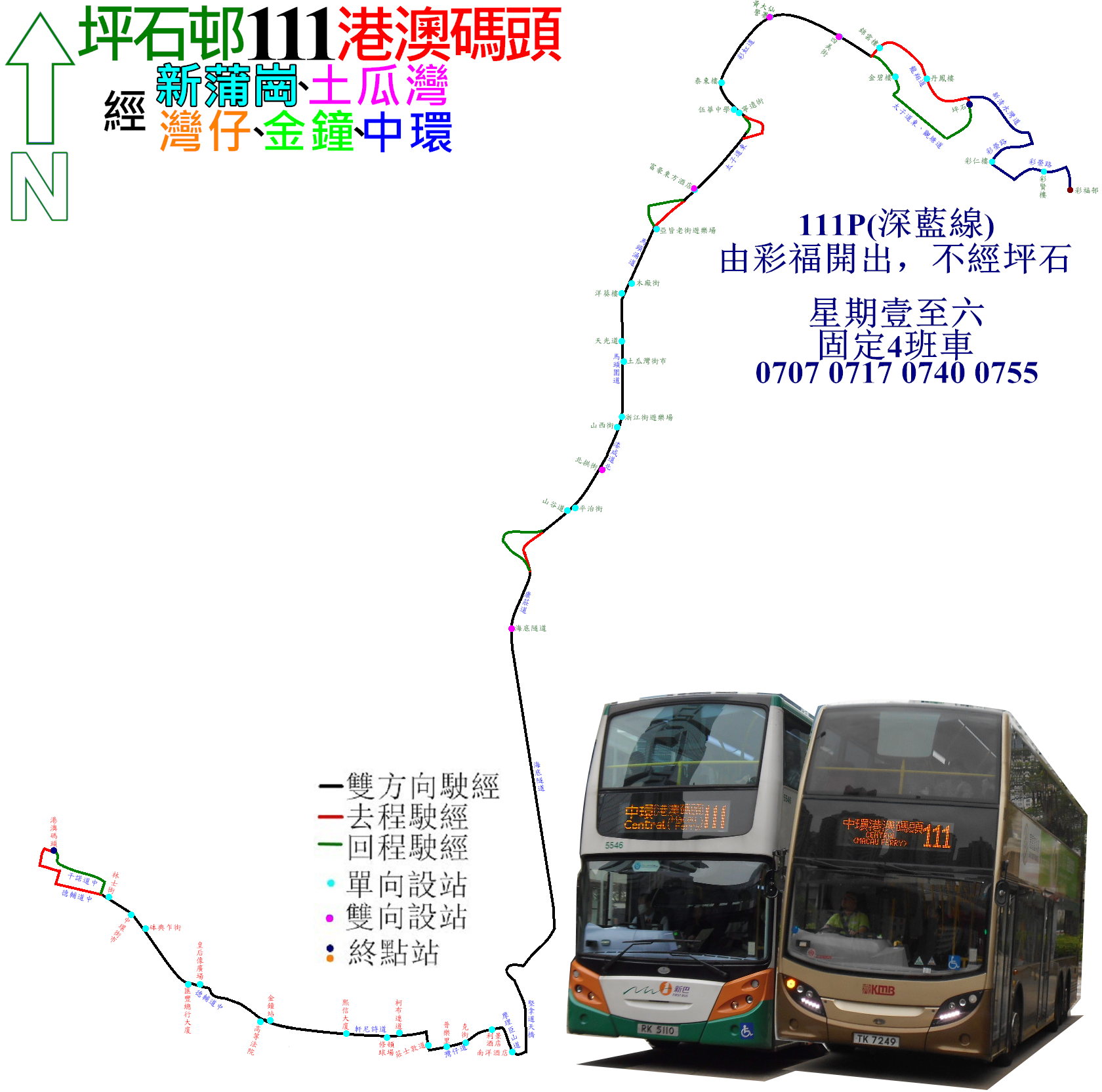 中文（香港）: 過海隧巴111線的走線圖